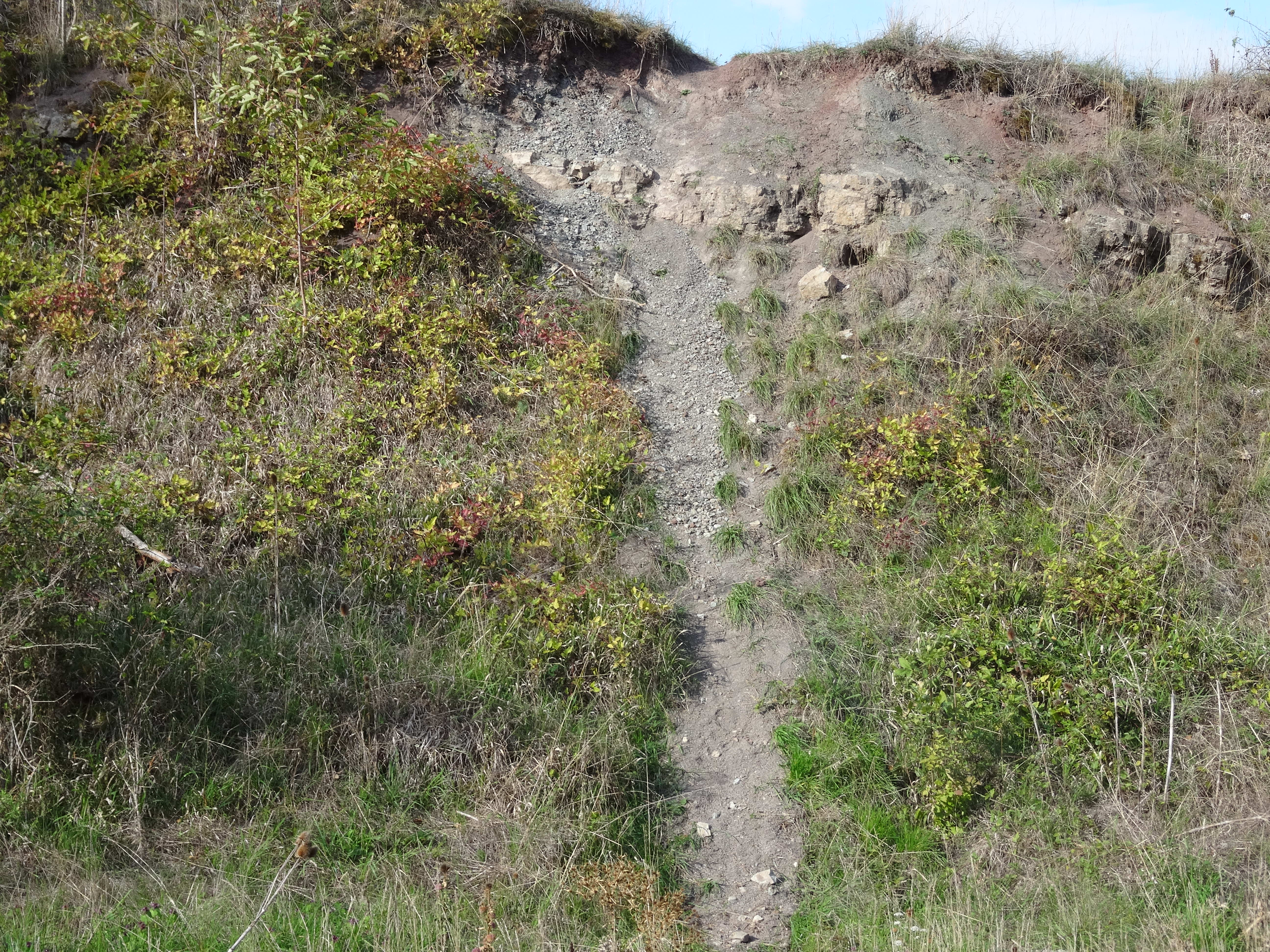 Geotop 675A009: Acrodus-Corbula-Zone SE von Nenzenheim Die Acrodus-Corbula-Bank aus dem Mittleren Keuper.